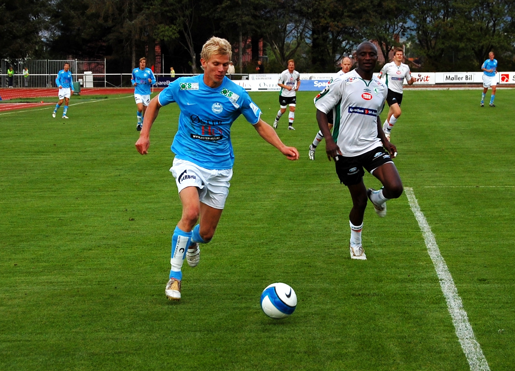 Morten Eriksen (Sandnes Ulf) og Efe Prince Ehiorobo (Løv-Ham) i et Adeccoliga-oppgjør på Sandnes idrettspark